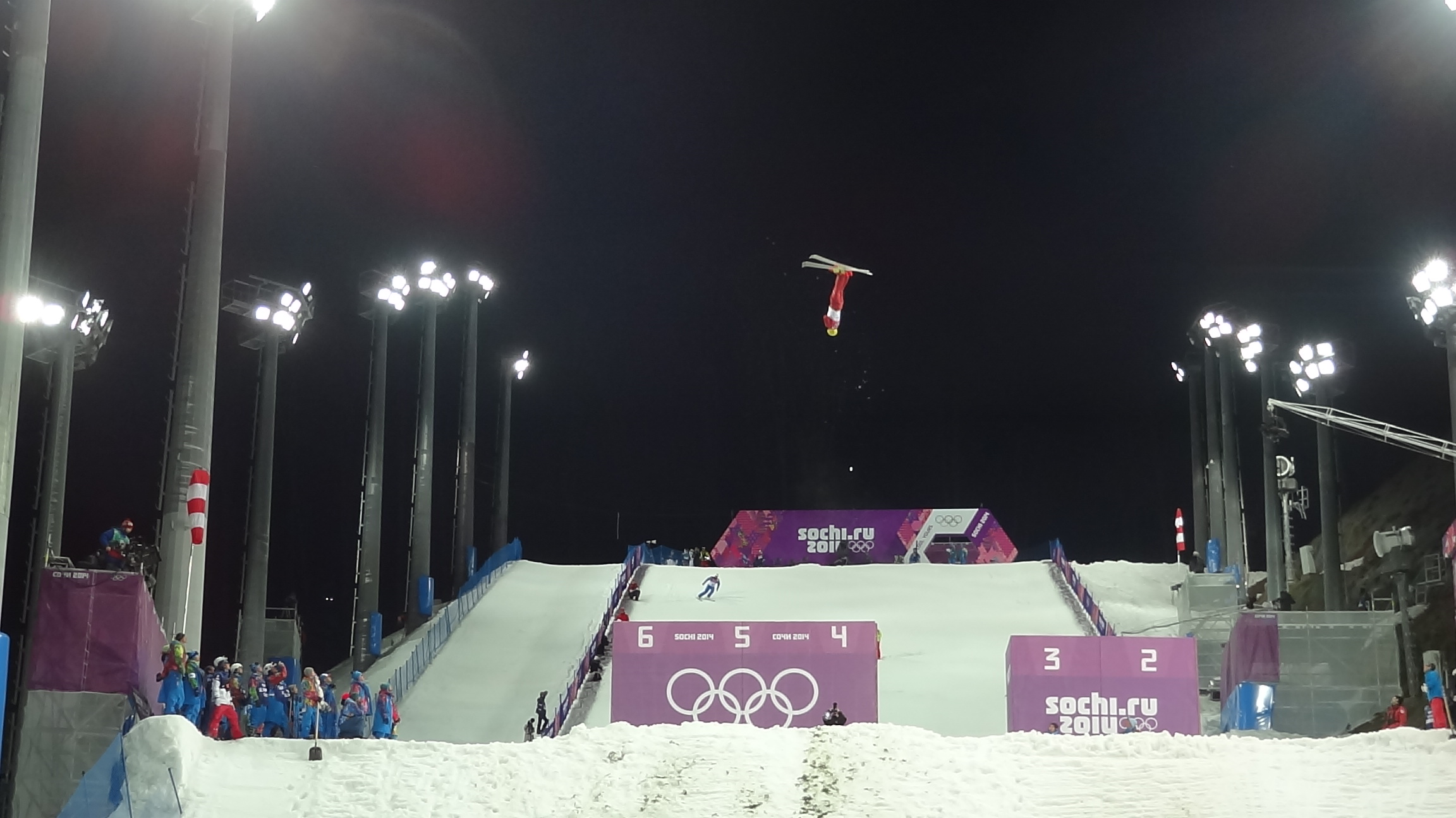 Экстрим-парк «Роза – Хутор» . Сочи, 17 февраля 2014 года. Мужской этап лыжной акробатики по фристайлу.